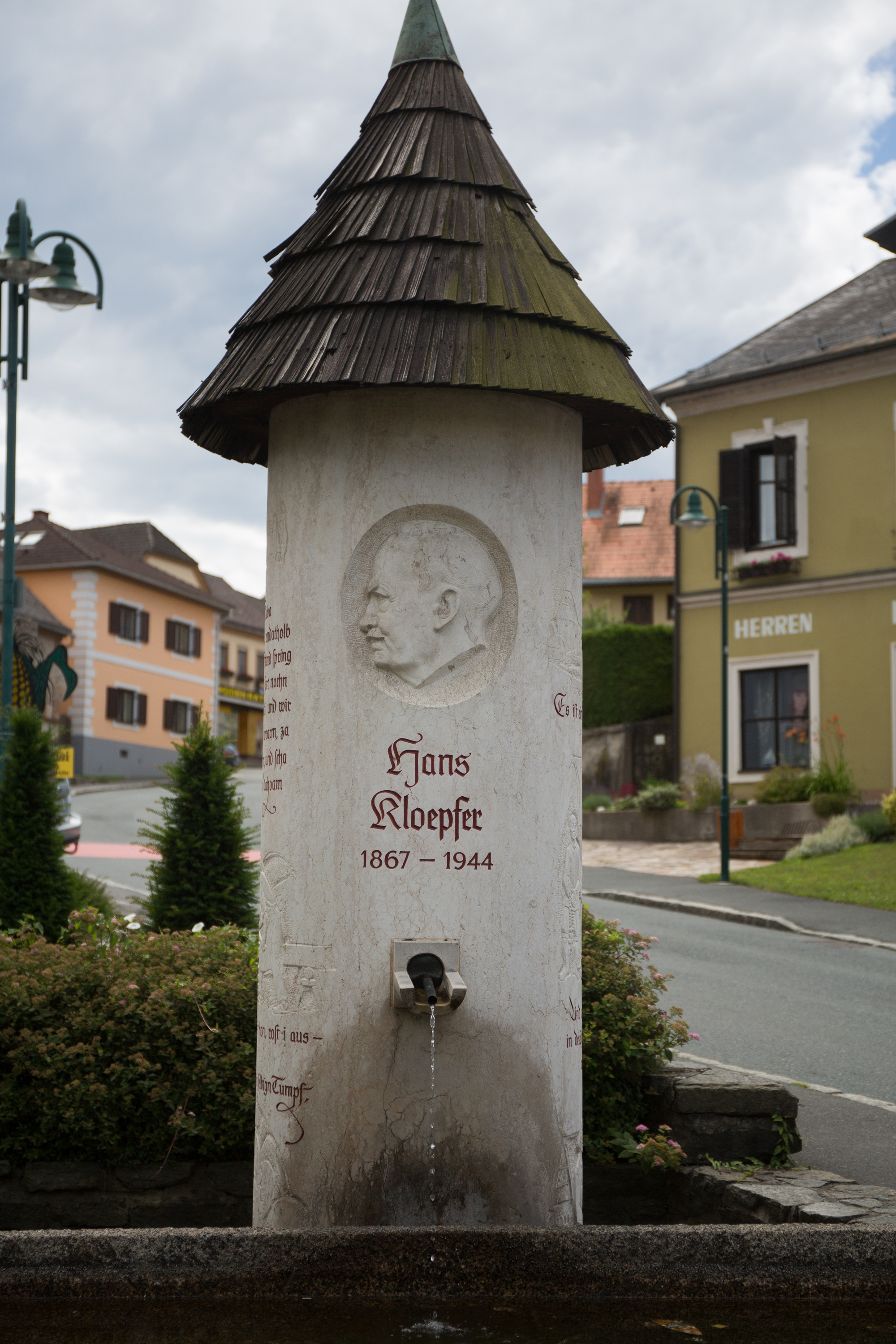 Hans Kloepfer-Brunnen in Eibiswald, Steiermark, Austria